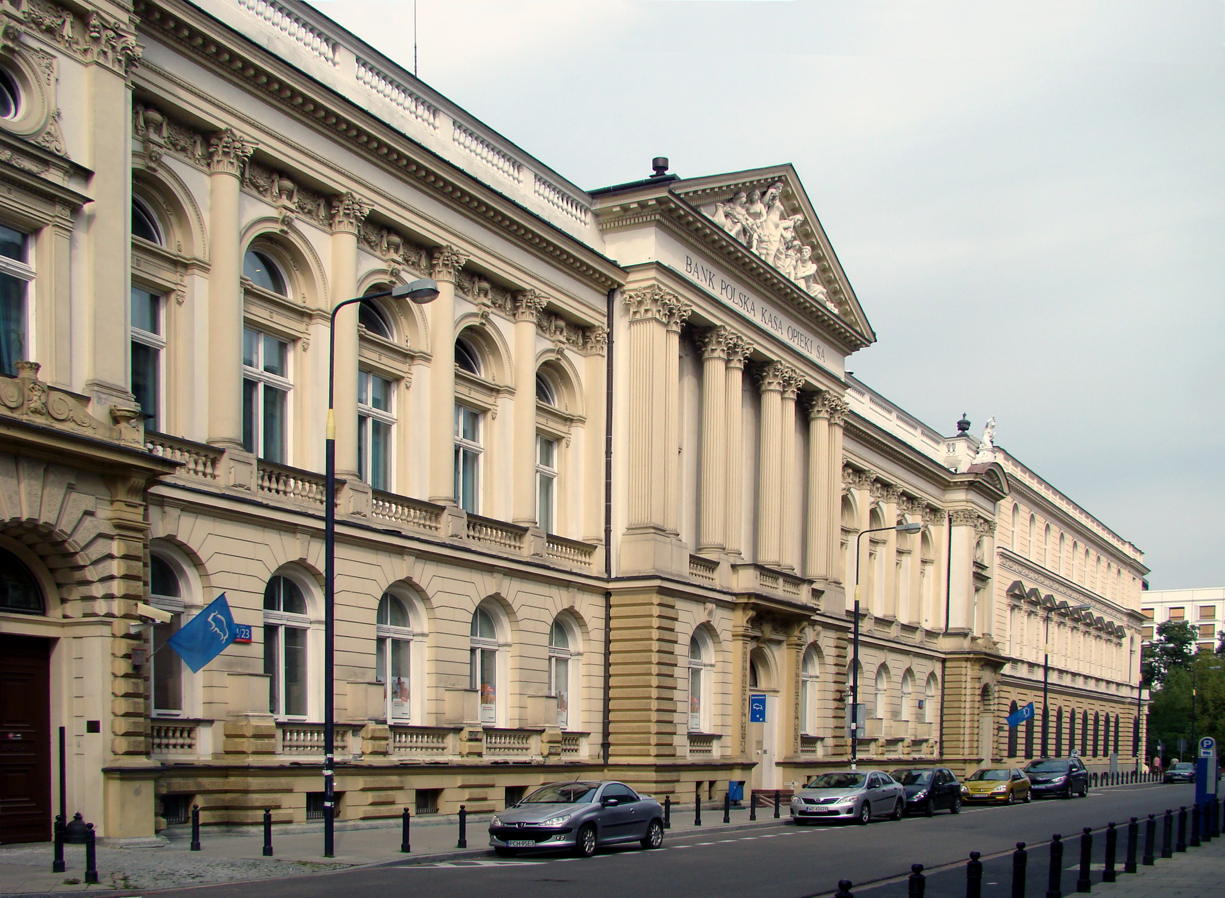 PeKaO - Warszawa, Czackiego 21/23